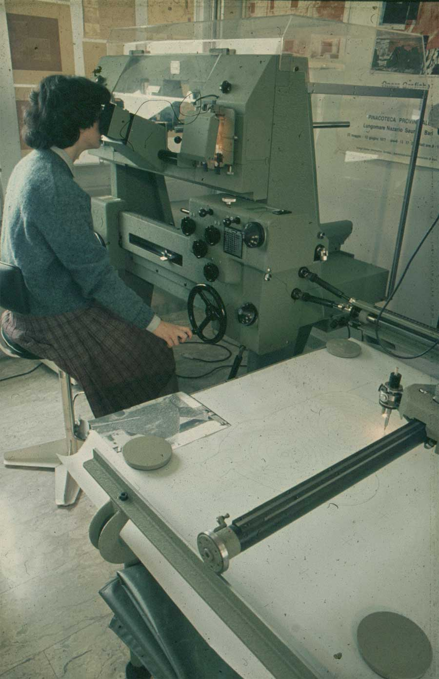 Restitutore fotogrammetrico Wild A40